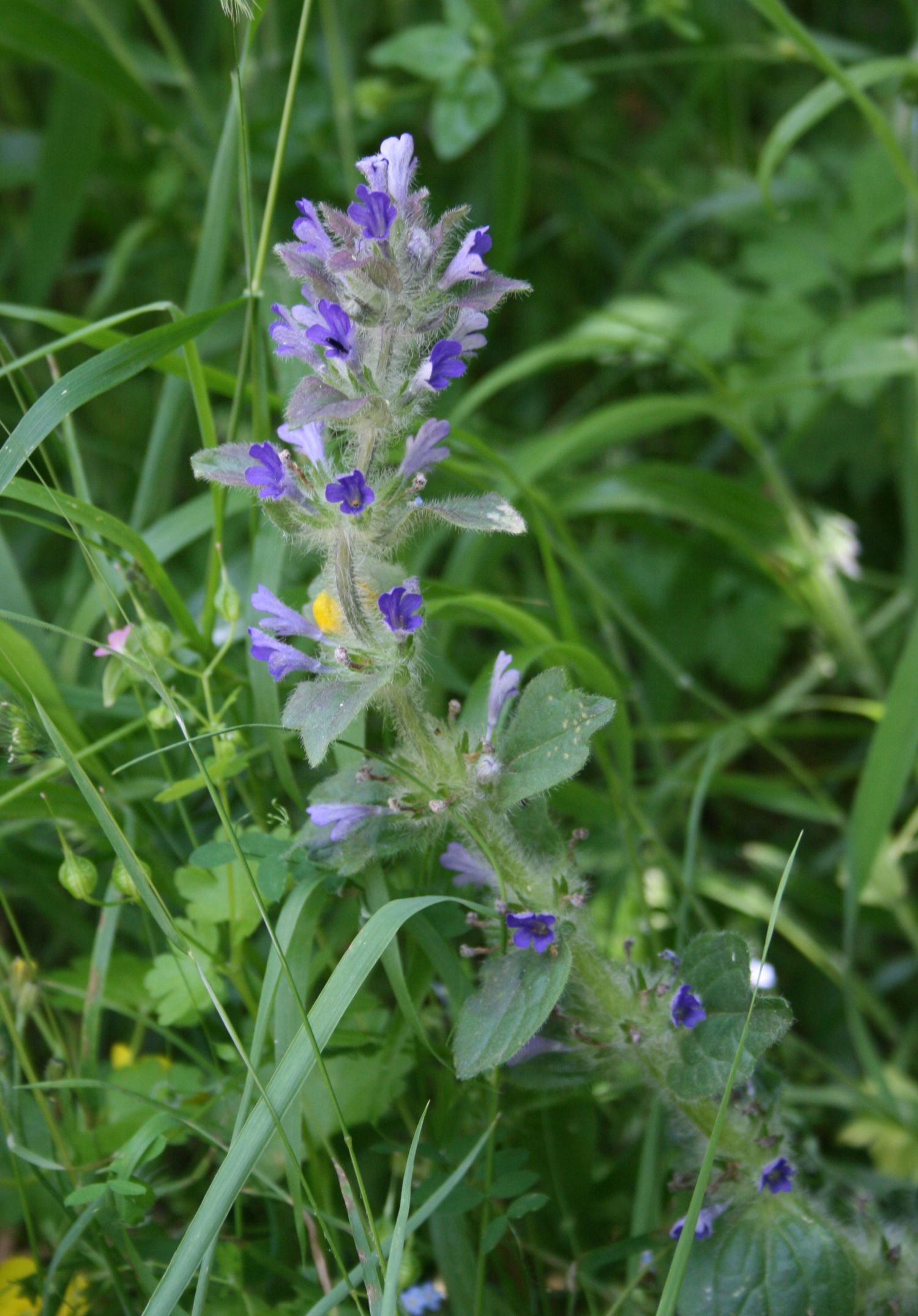 Ajuga orientalis, Lippenblütler (Lamiaceae) - Italien/Italia/Italy: Kalabrien/Calabria, Prov. Reggio Calabria, Aspromonte, bei San Peri, SSE Scilla